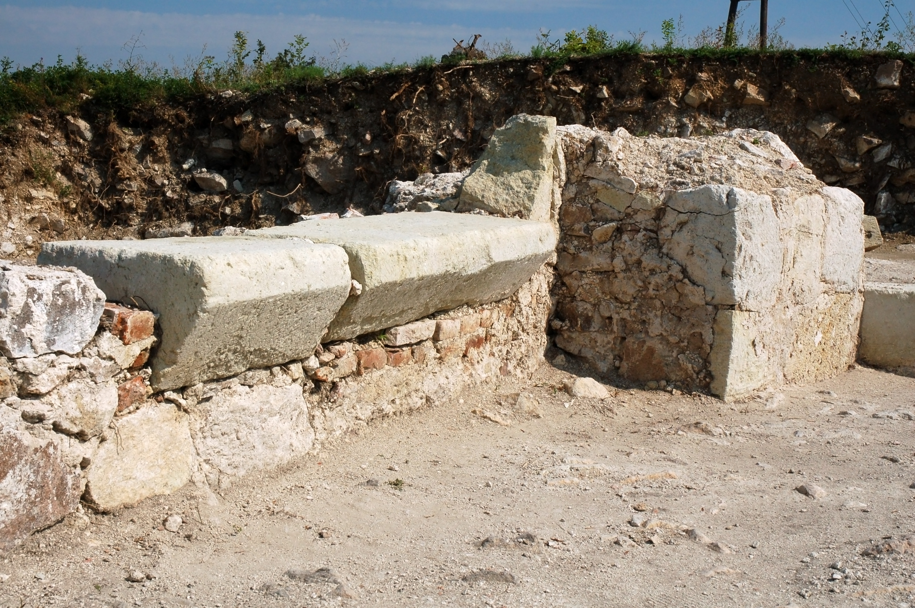 A Sátoraljaújhelyi vár feltárásának állapota 2010-ben. Ülőfülkemaradvány a vár keleti felében.